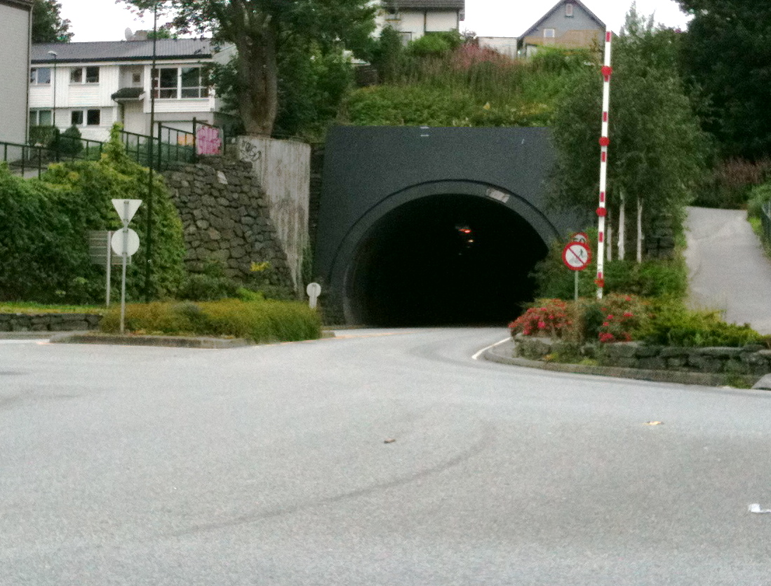 Storhaugtunnelen i Stavanger